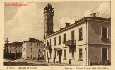 Беларуская (тарашкевіца): Від на пажарную каланчу ў Гродне